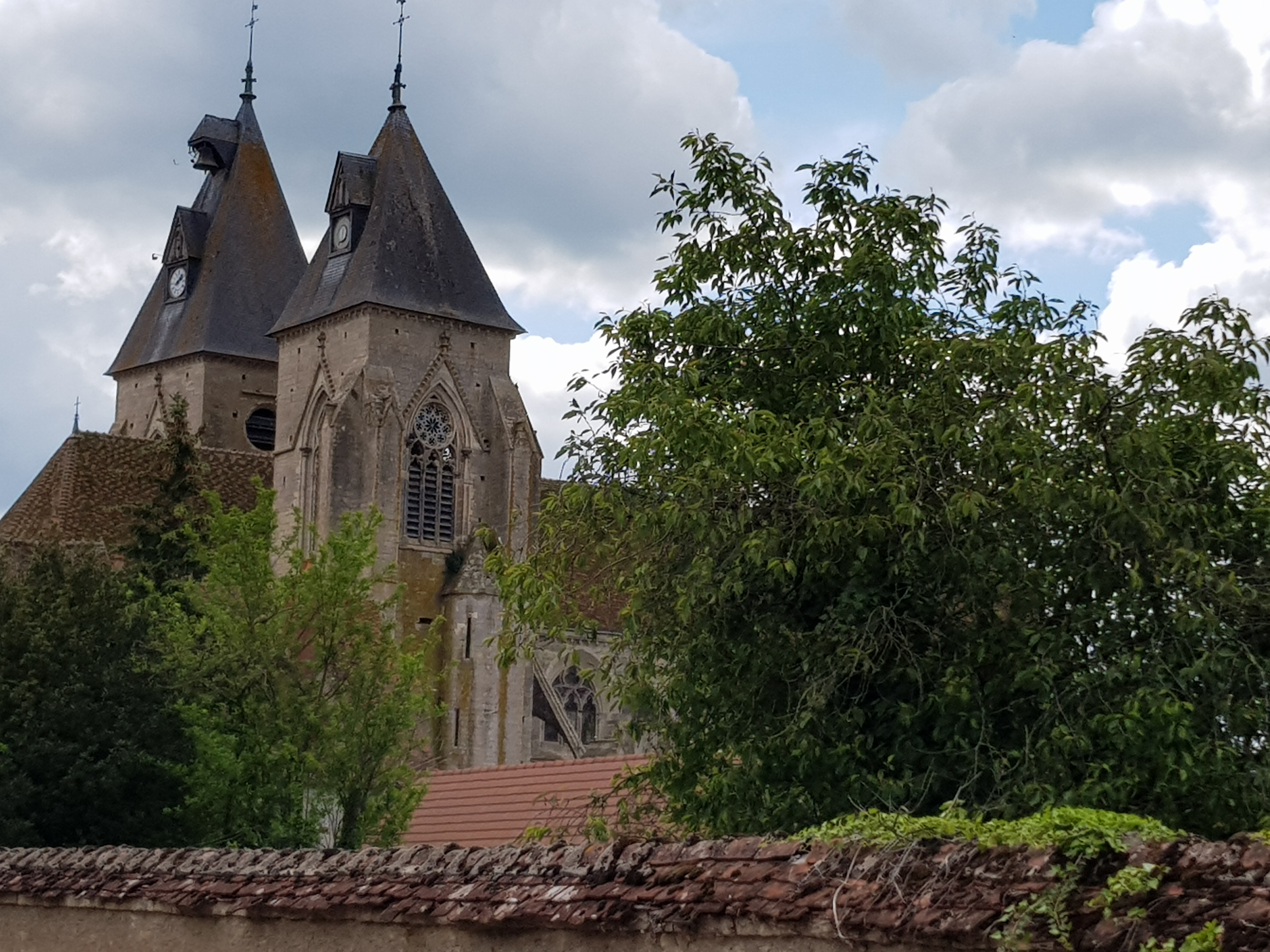 Clochers de l'église Saint-Pierre à Varzy (Nièvre).